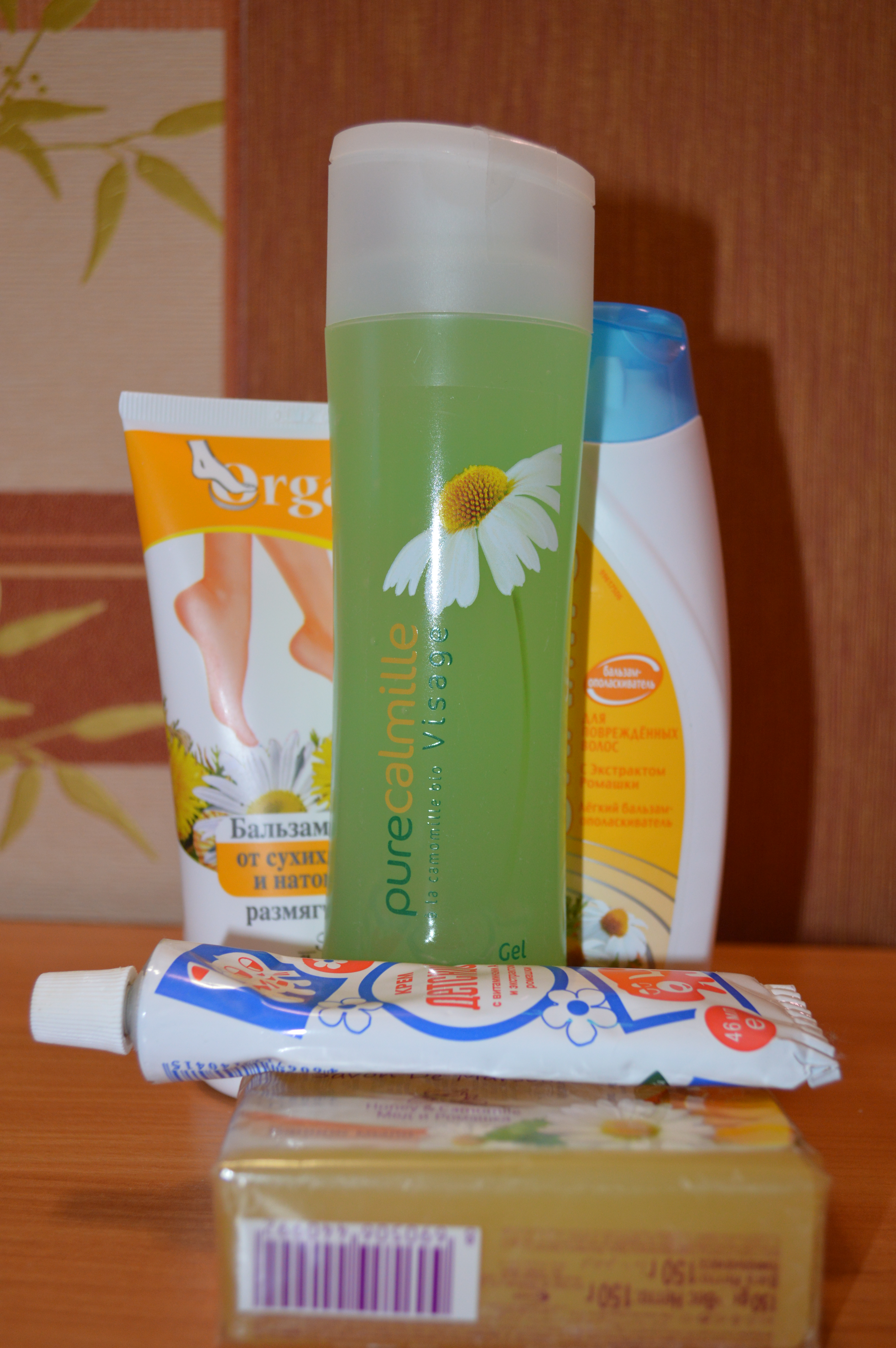 Косметические средства различных фирм с ромашкой